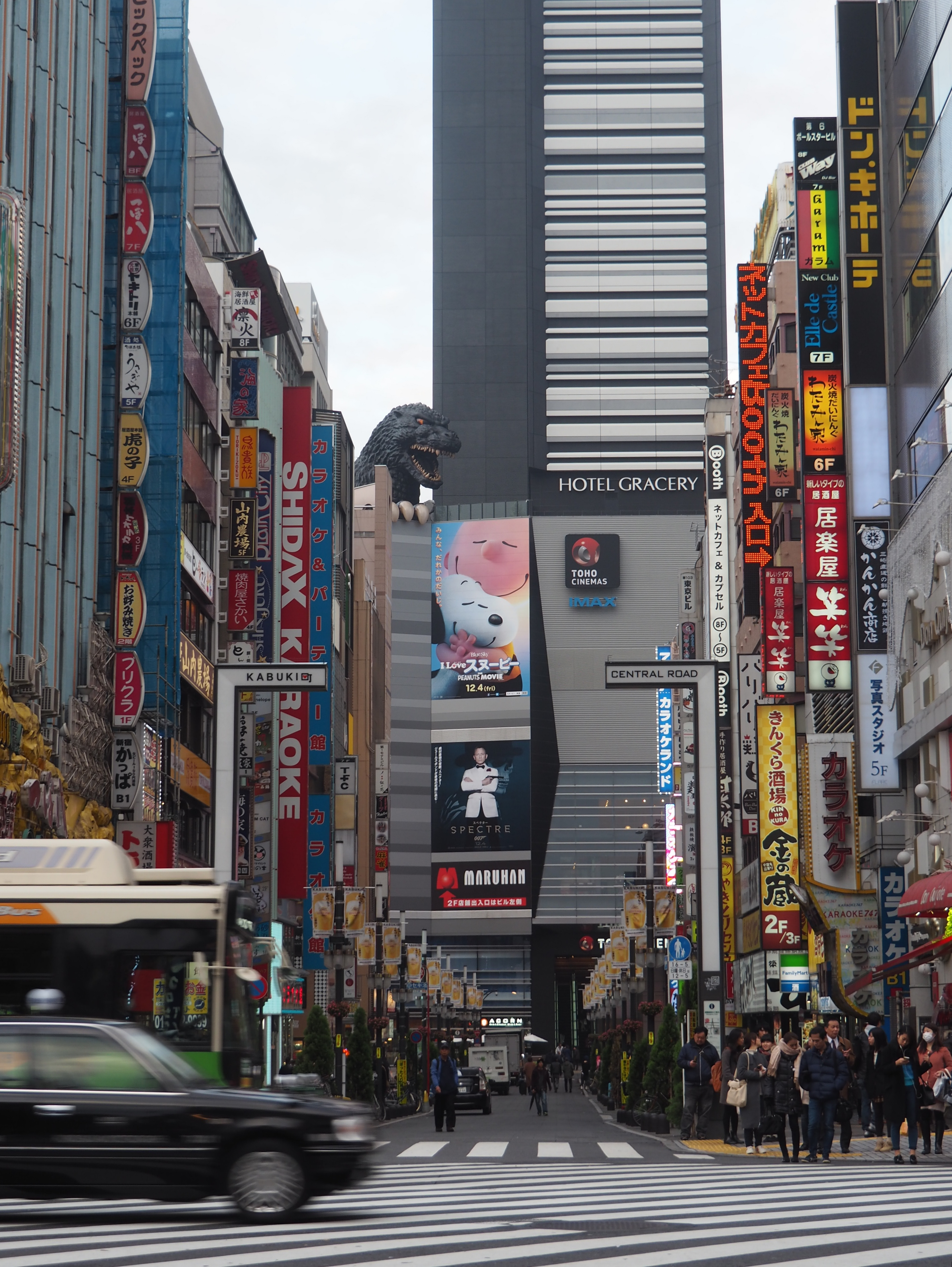 Shinjuku